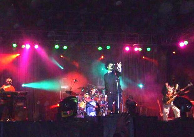 1º Show do Cidade Negra com nova formação em 2008